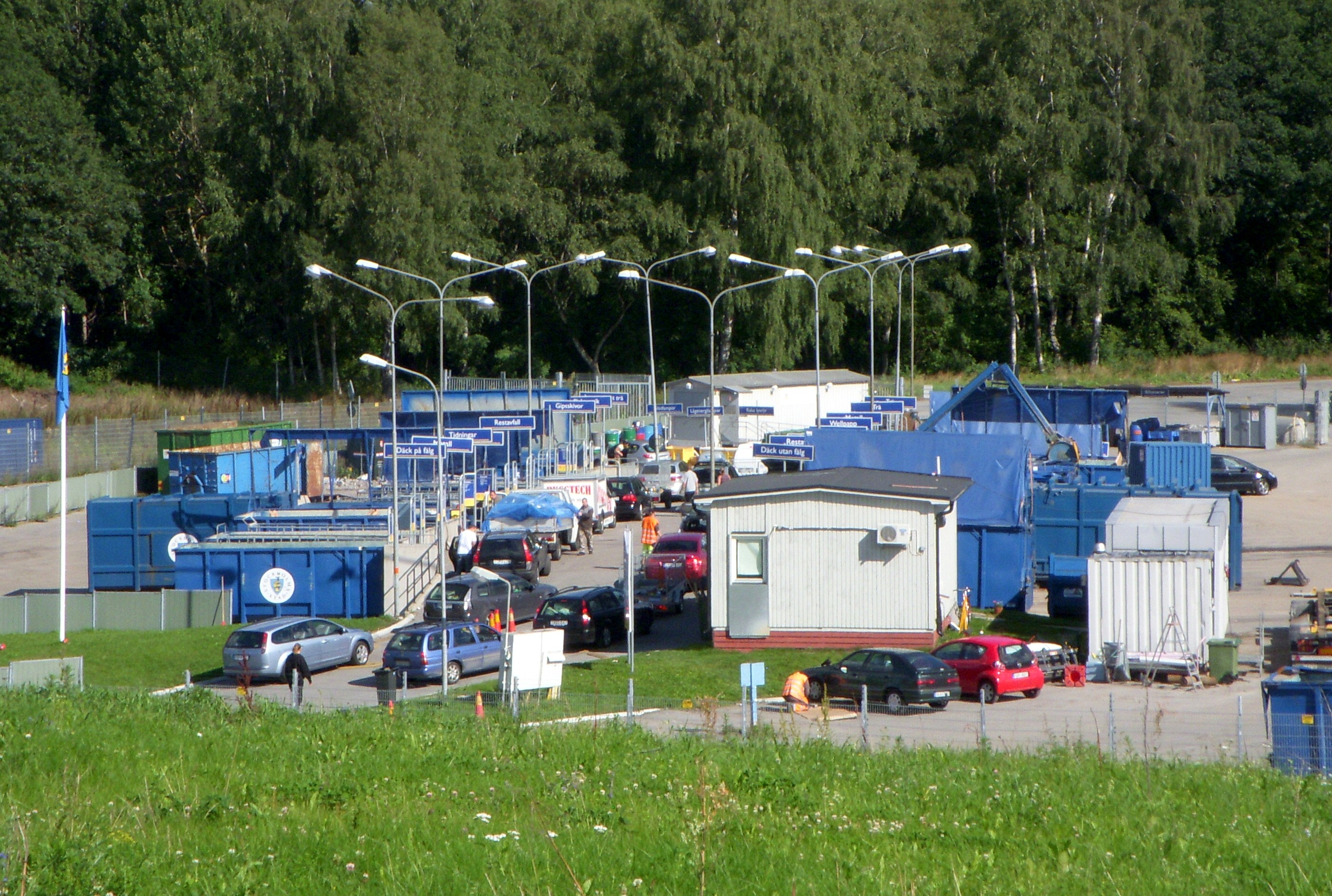 Lövsta sopåtervinning